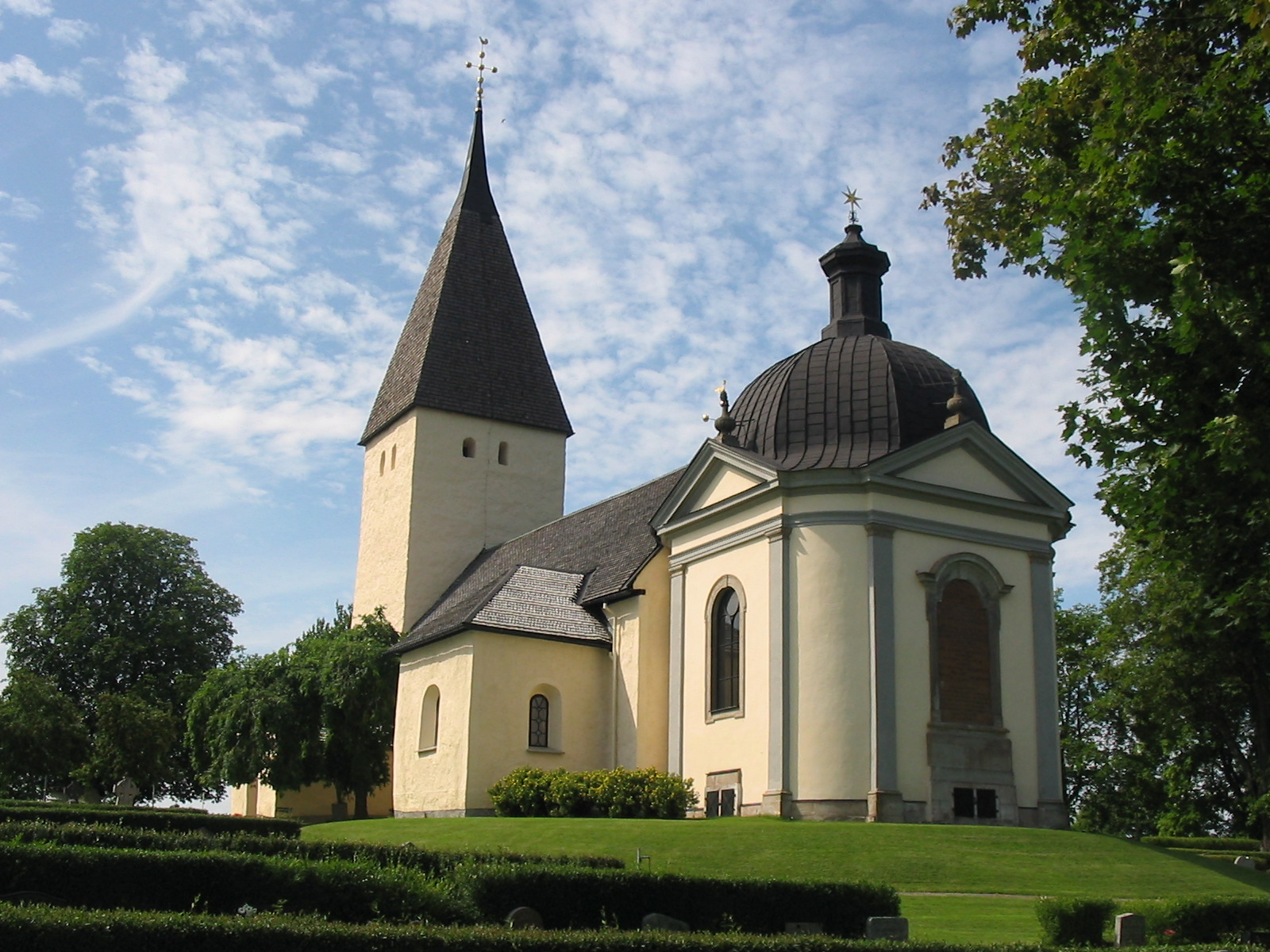 fotat av Turist(Tompen0000), 2004.